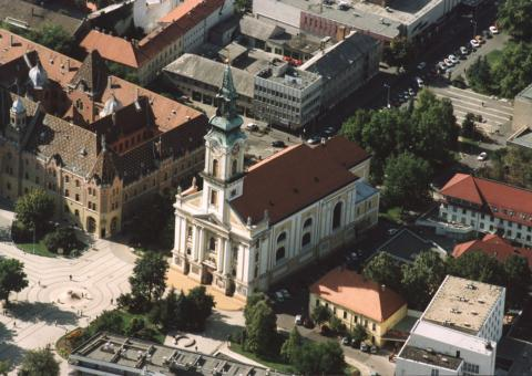 Kecskemét, Hungary, aerialphotography